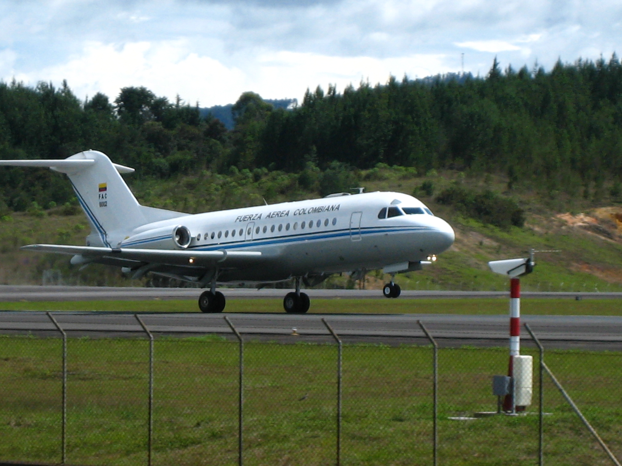 Avion presidencial de colombia FAC 0002. Fuerza Aérea Colombiana Fokker F28